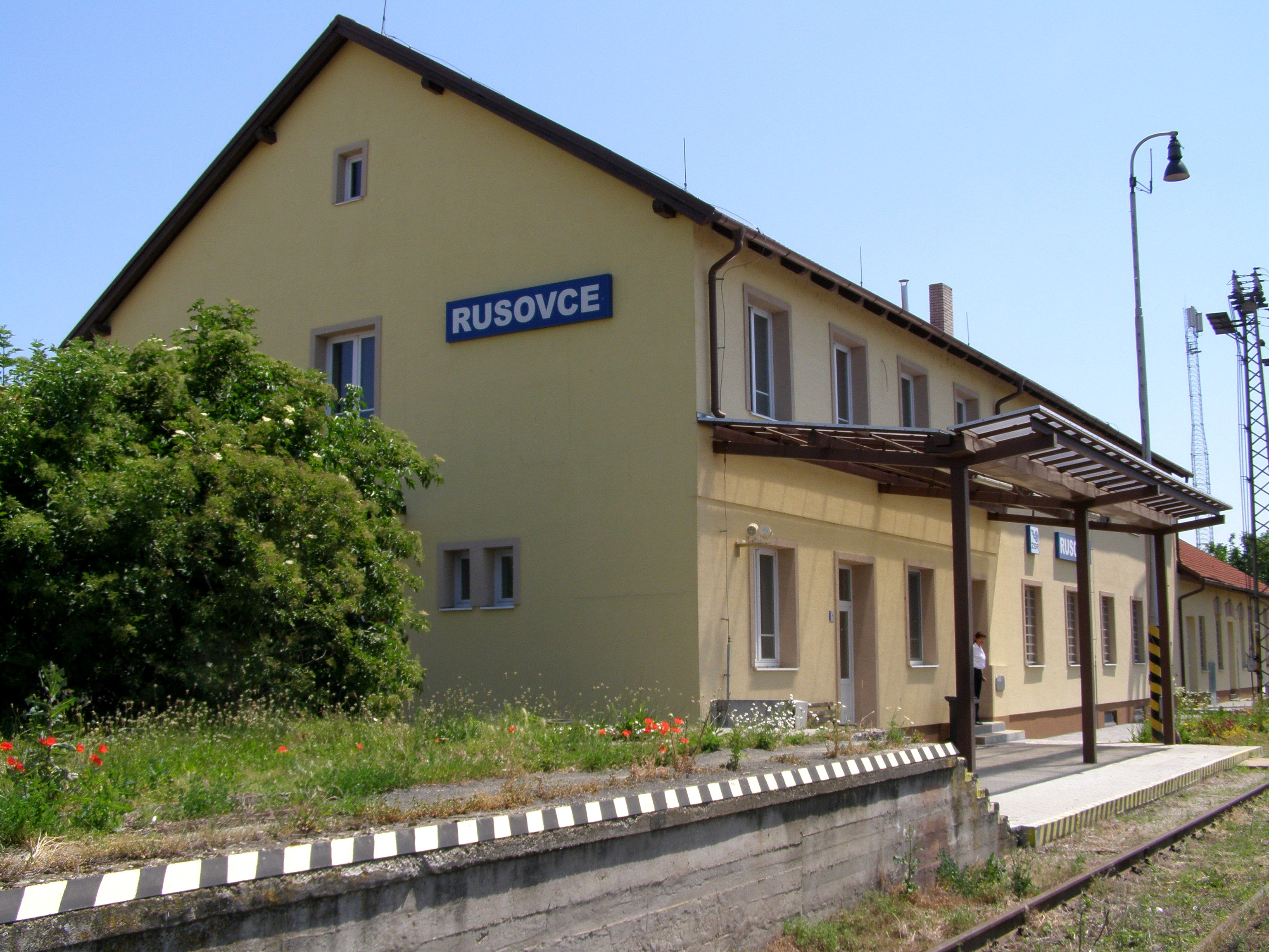 Budova železničnej stanice Bratislava-Rusovce